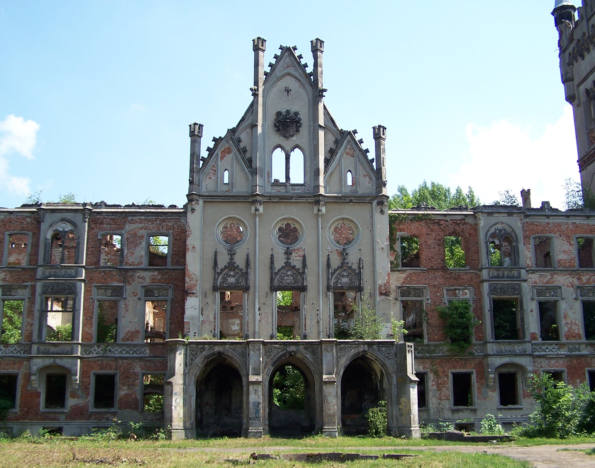 Pałac w Kopicach (woj. opolskie)